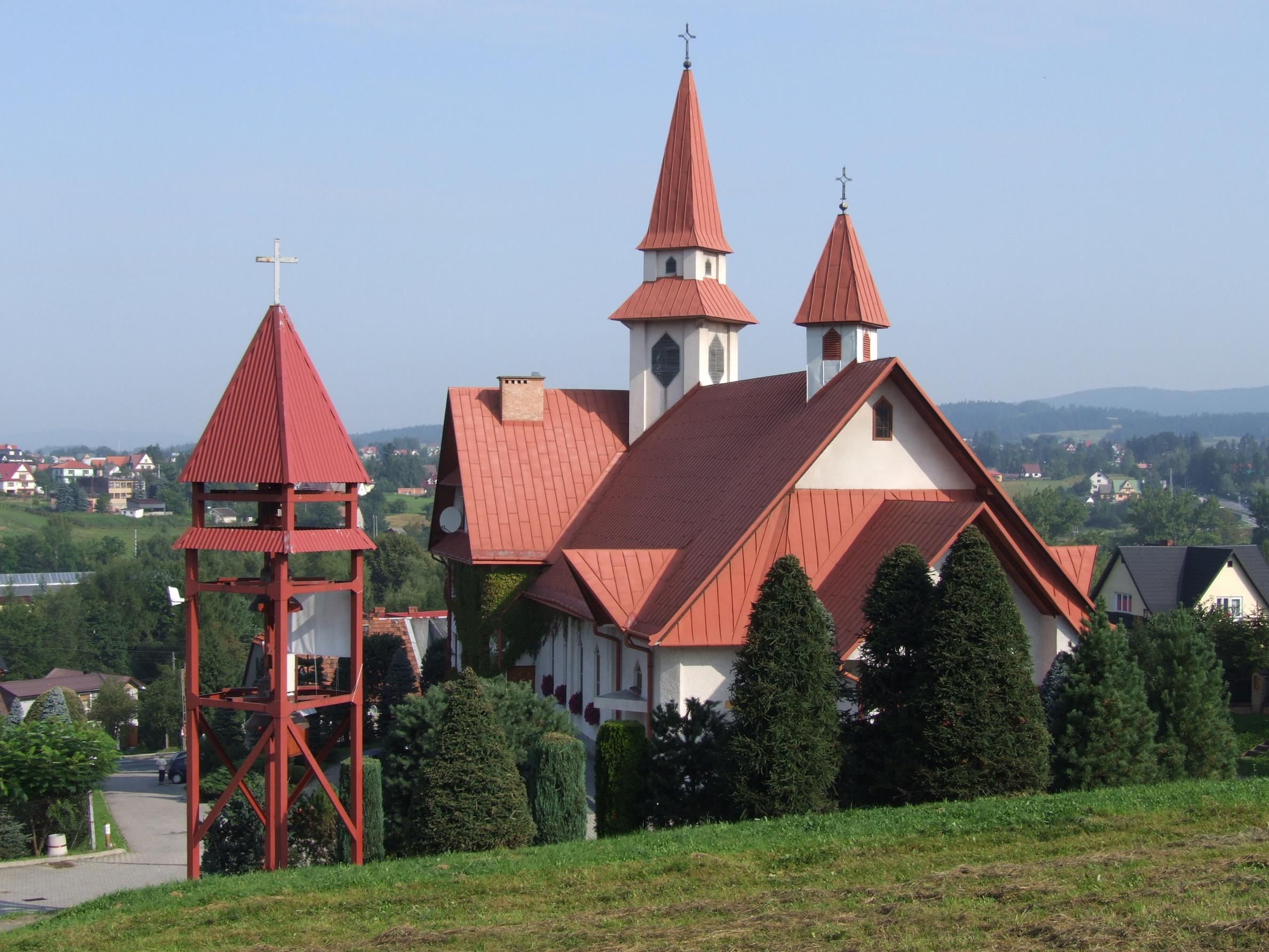 Kościół w Chabówce